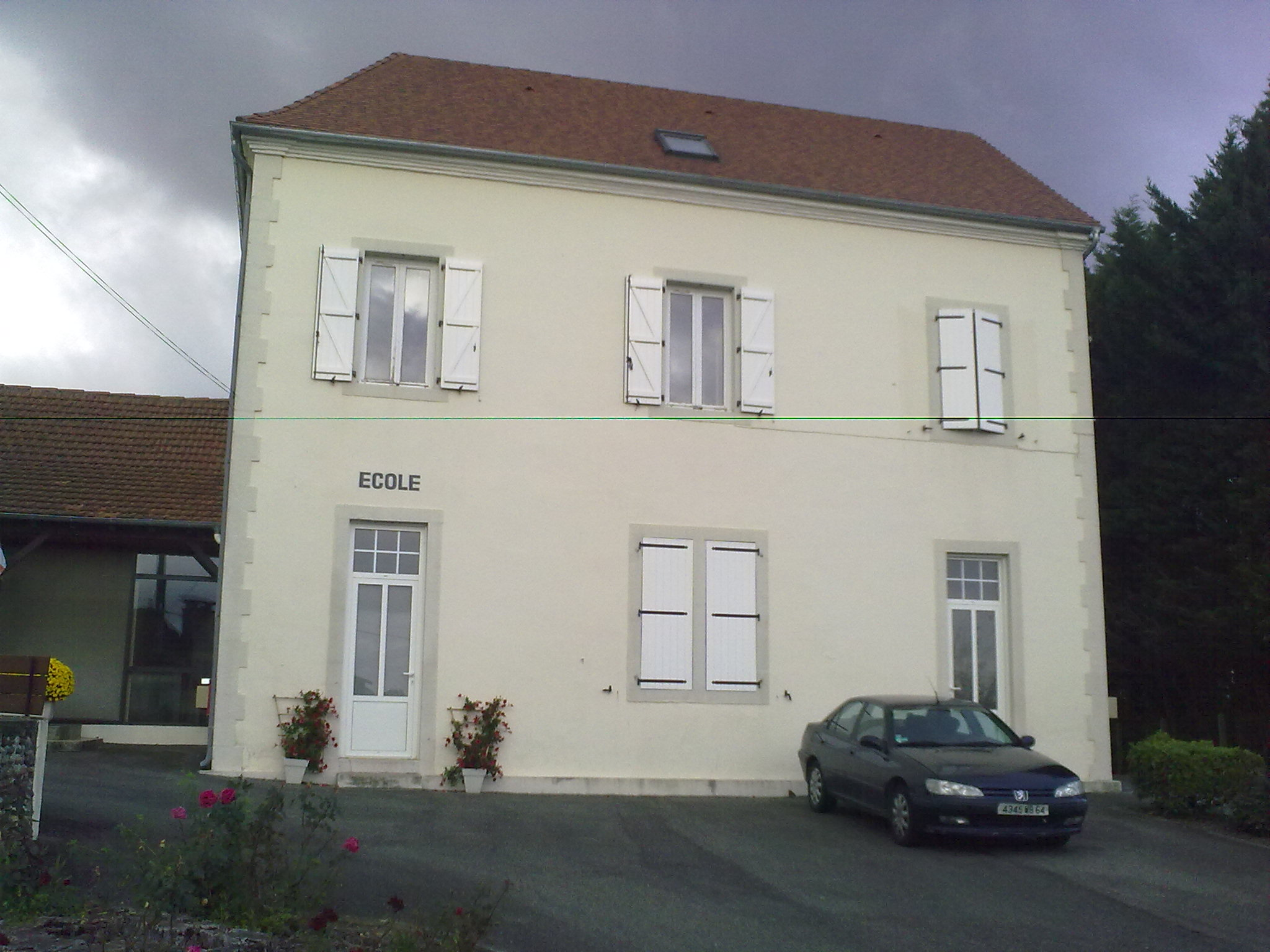 Castillon (Canton d'Arthez-de-Béarn)